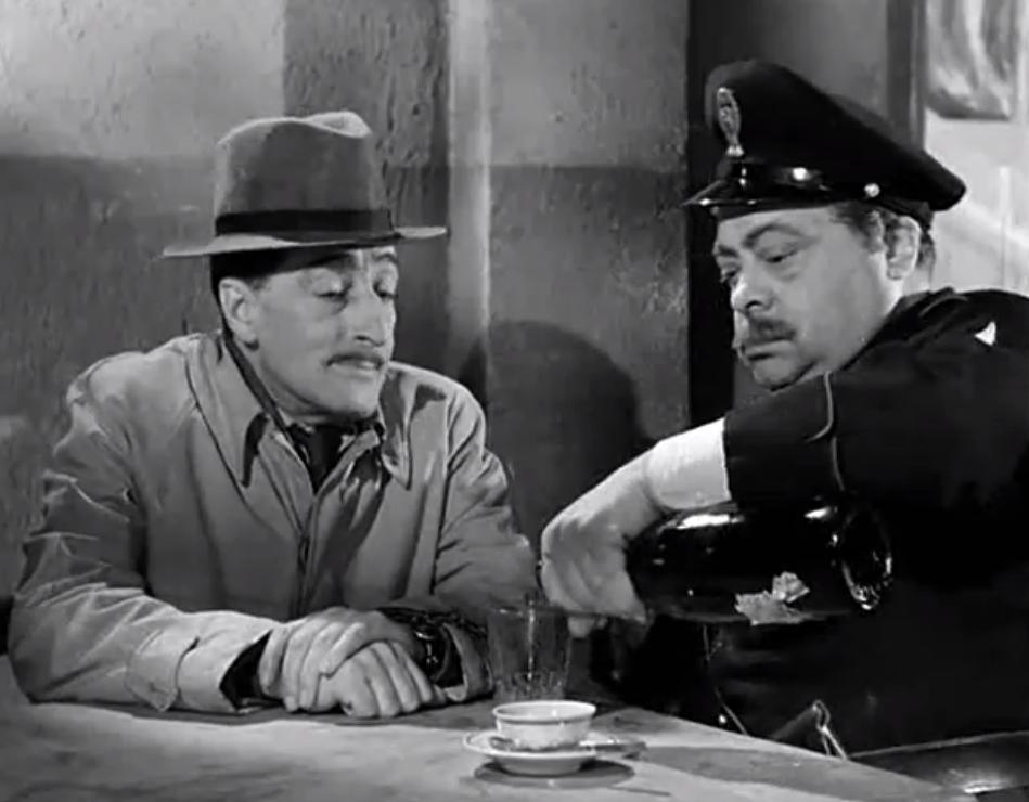 Screenshot del film Guardie e Ladri di Mario Monicelli. In scena Totò (a sinistra) e Aldo Fabrizi (a destra)